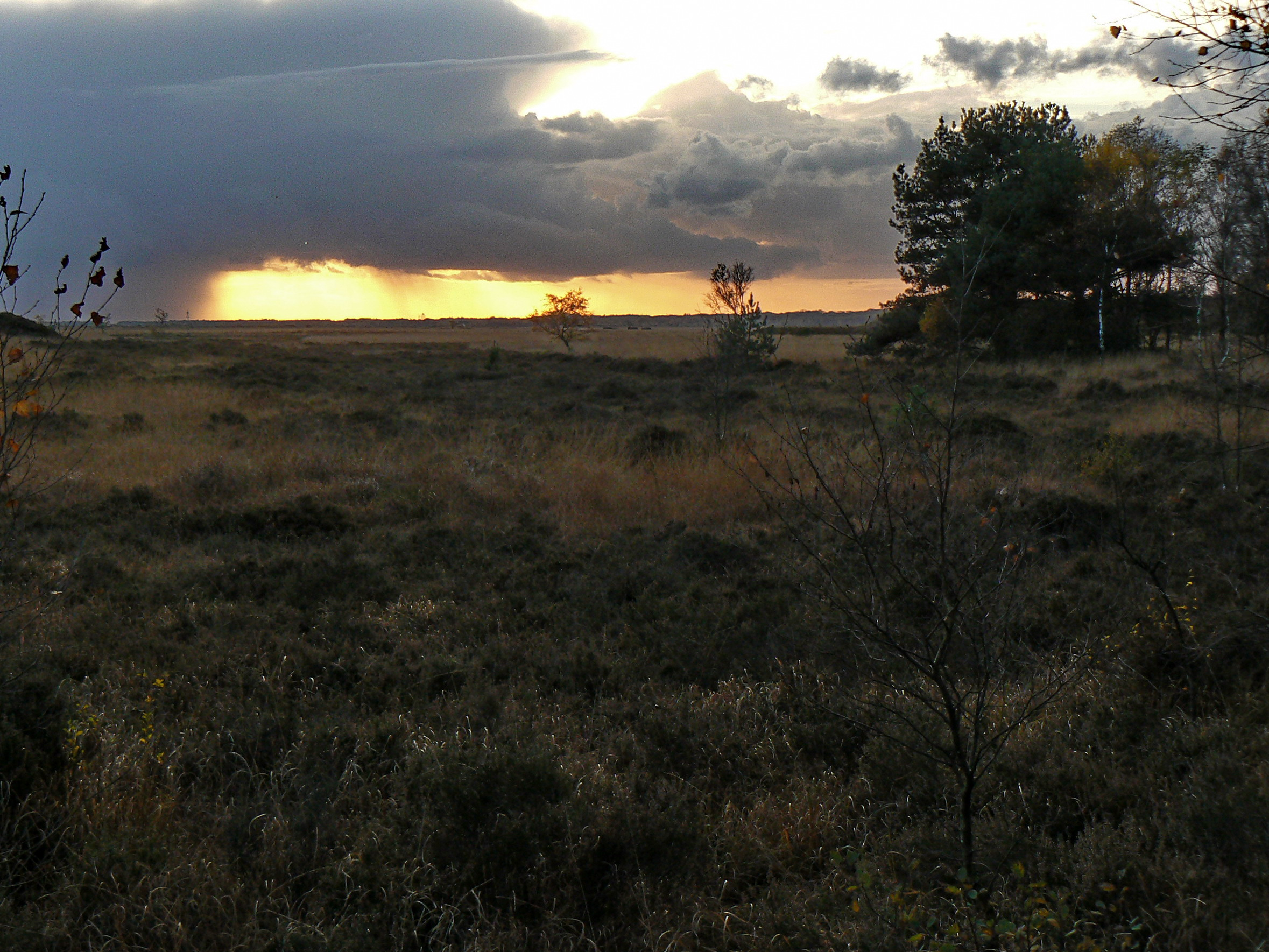 Groot Schietveld, Antwerpen, Belgium